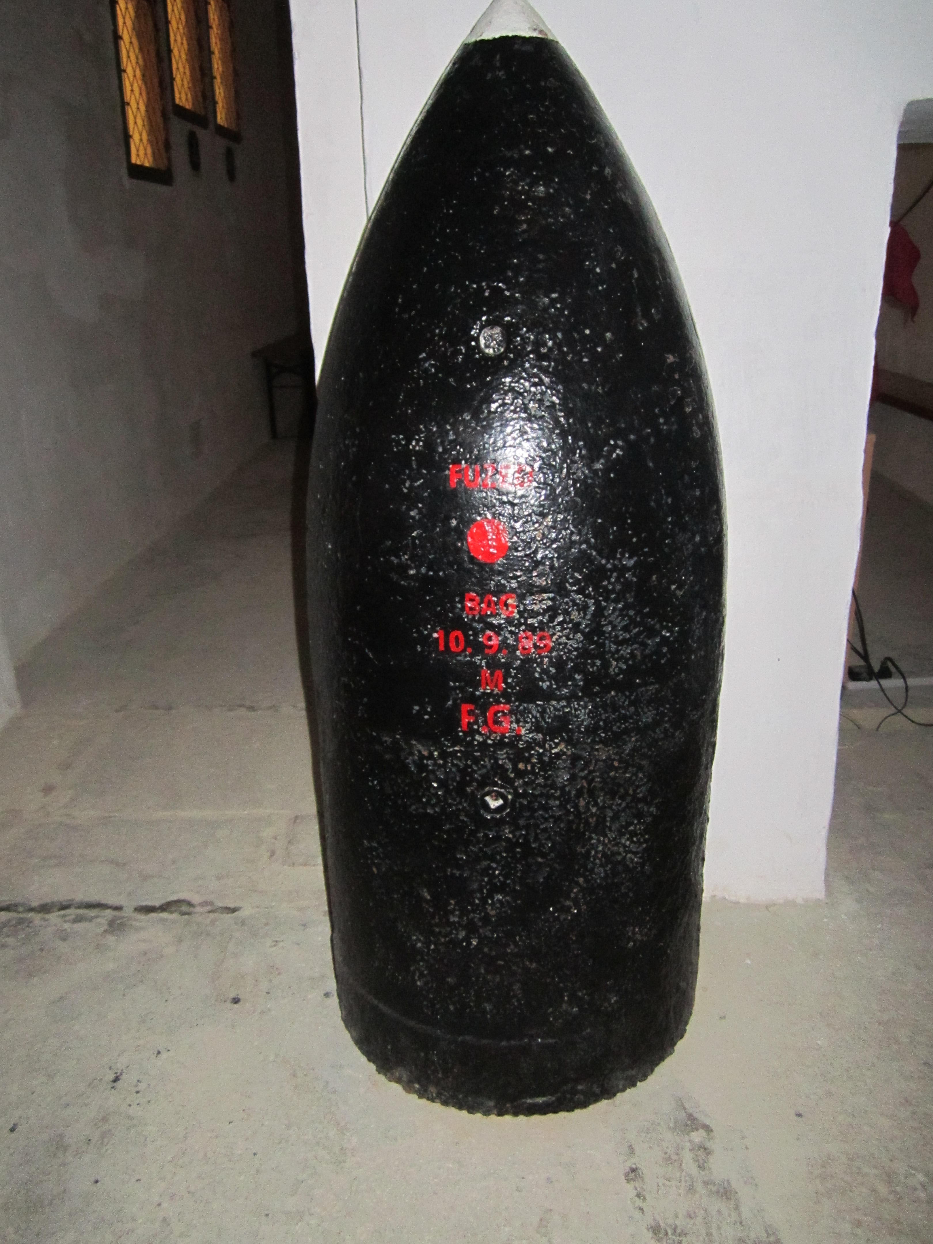 Proyectil del cañón Armstrong perforante